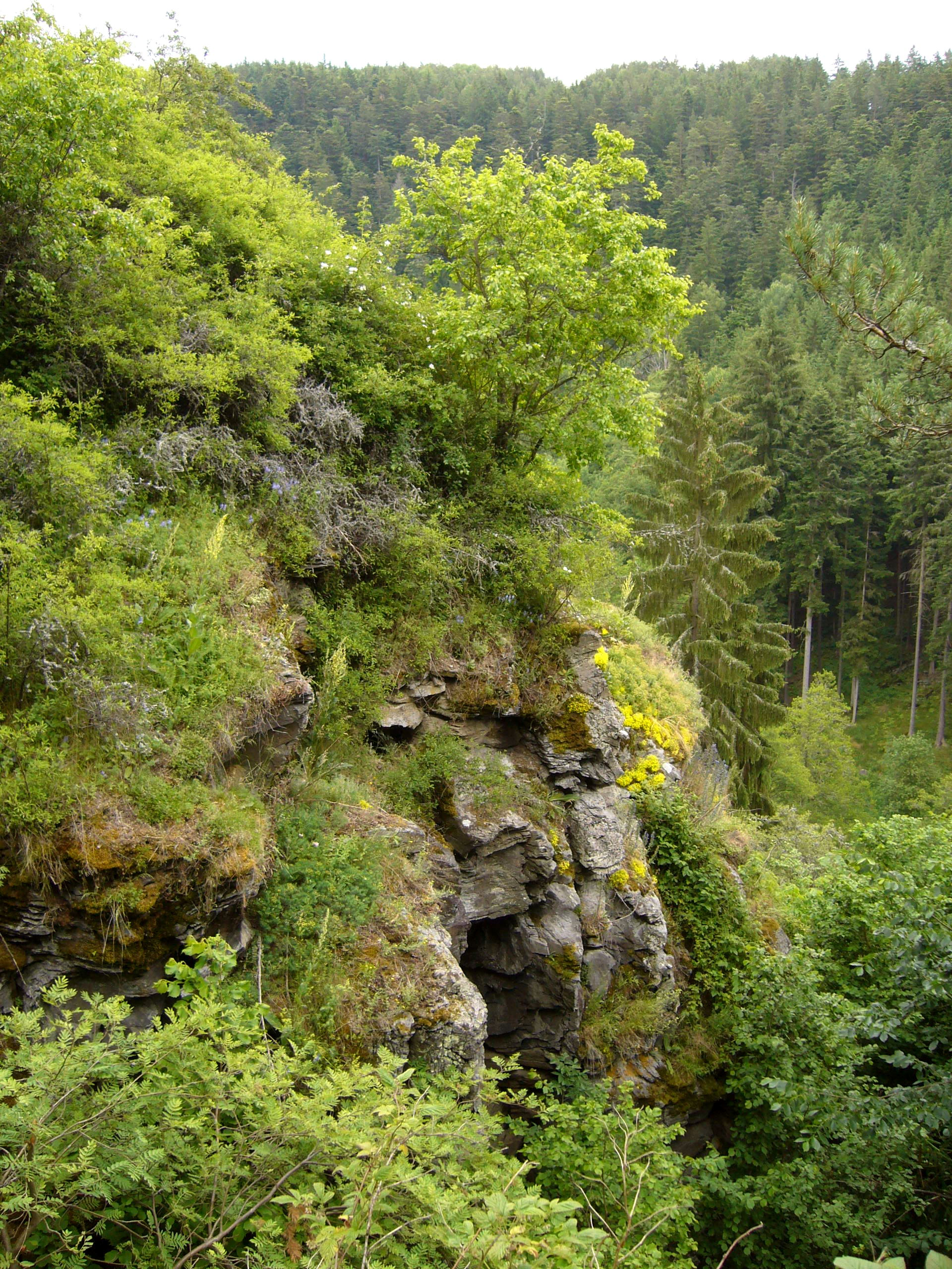 Hrad Falkenstein u Potína - skála s částí hradního jádra nad Úterským potokem